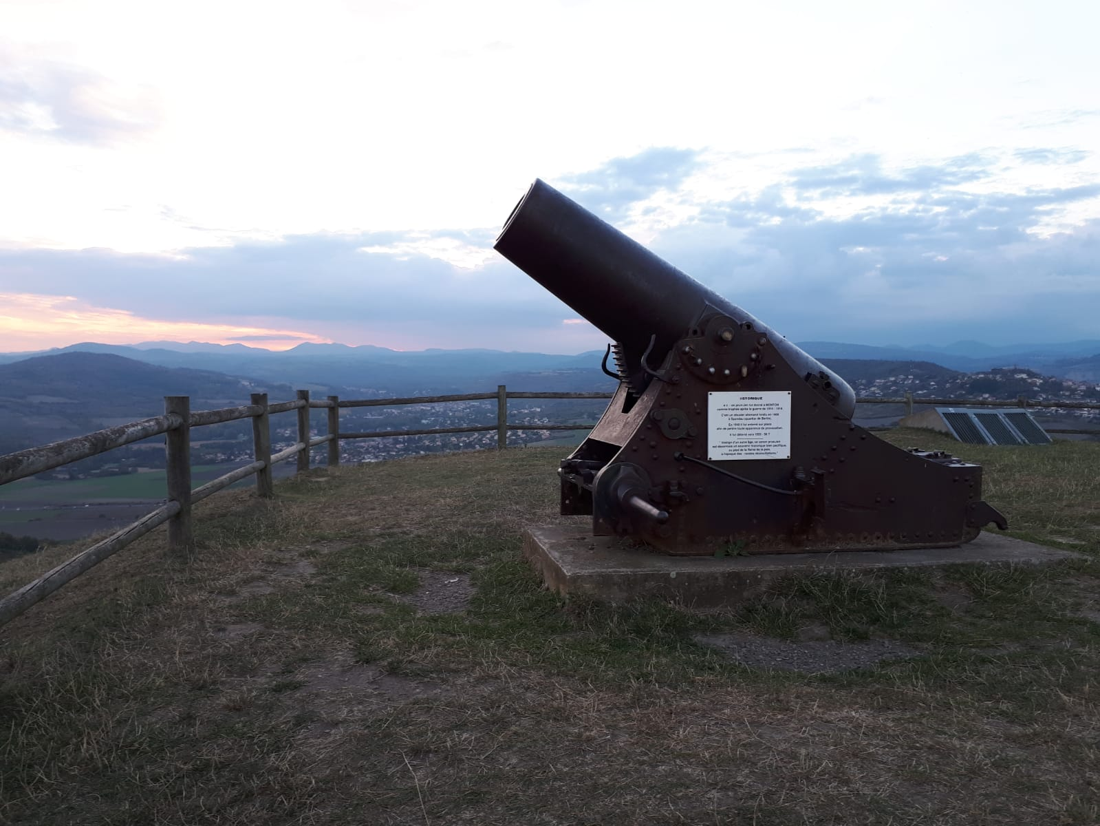 Canon prussien donné à Monton comme trophée après la guerre de 1914-1918. Obusier allemand fondu en 1900 à Spandau (quartier de Berlin)